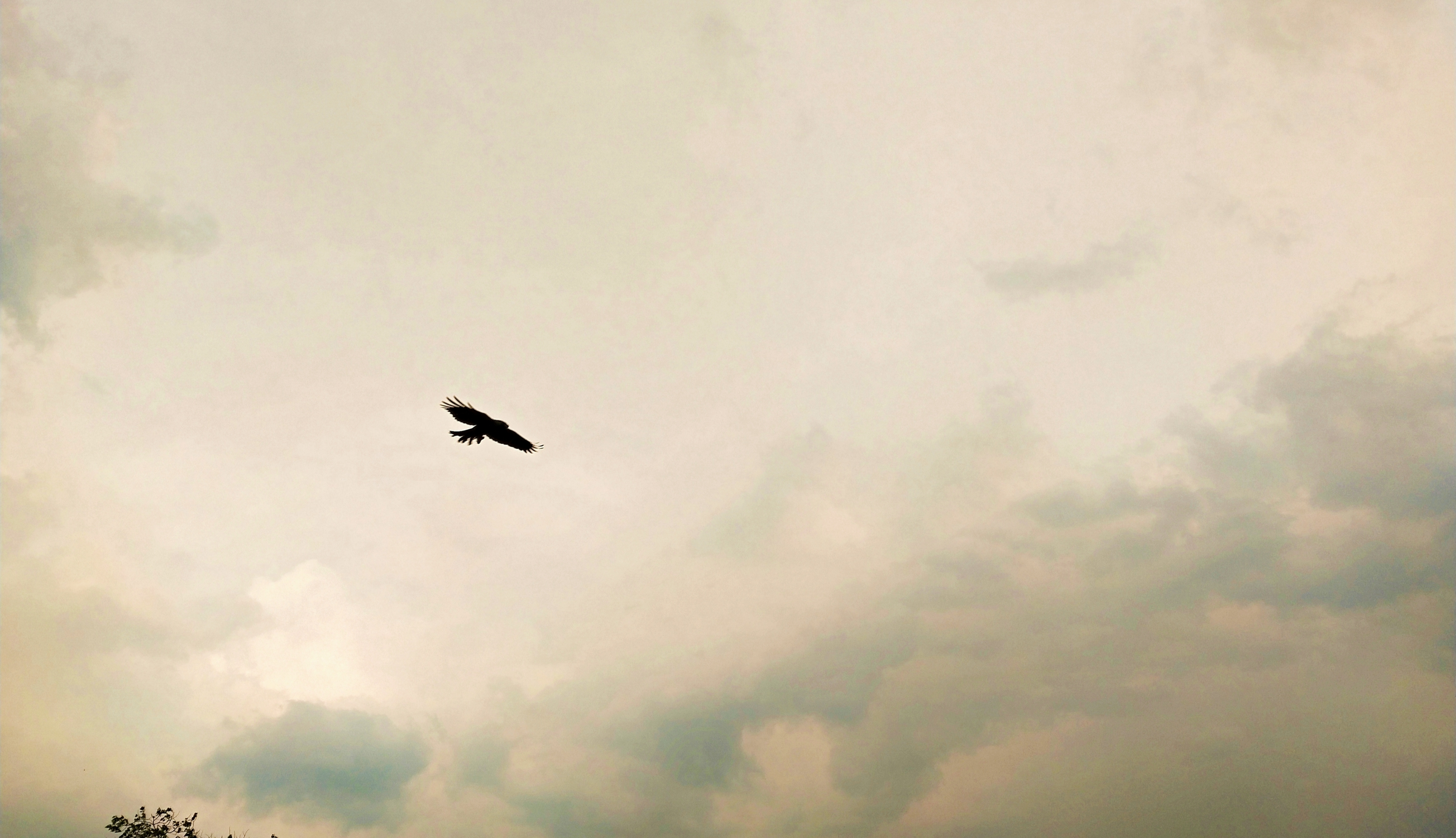 पीला आकाश में उड़ता हुआ परिंदा